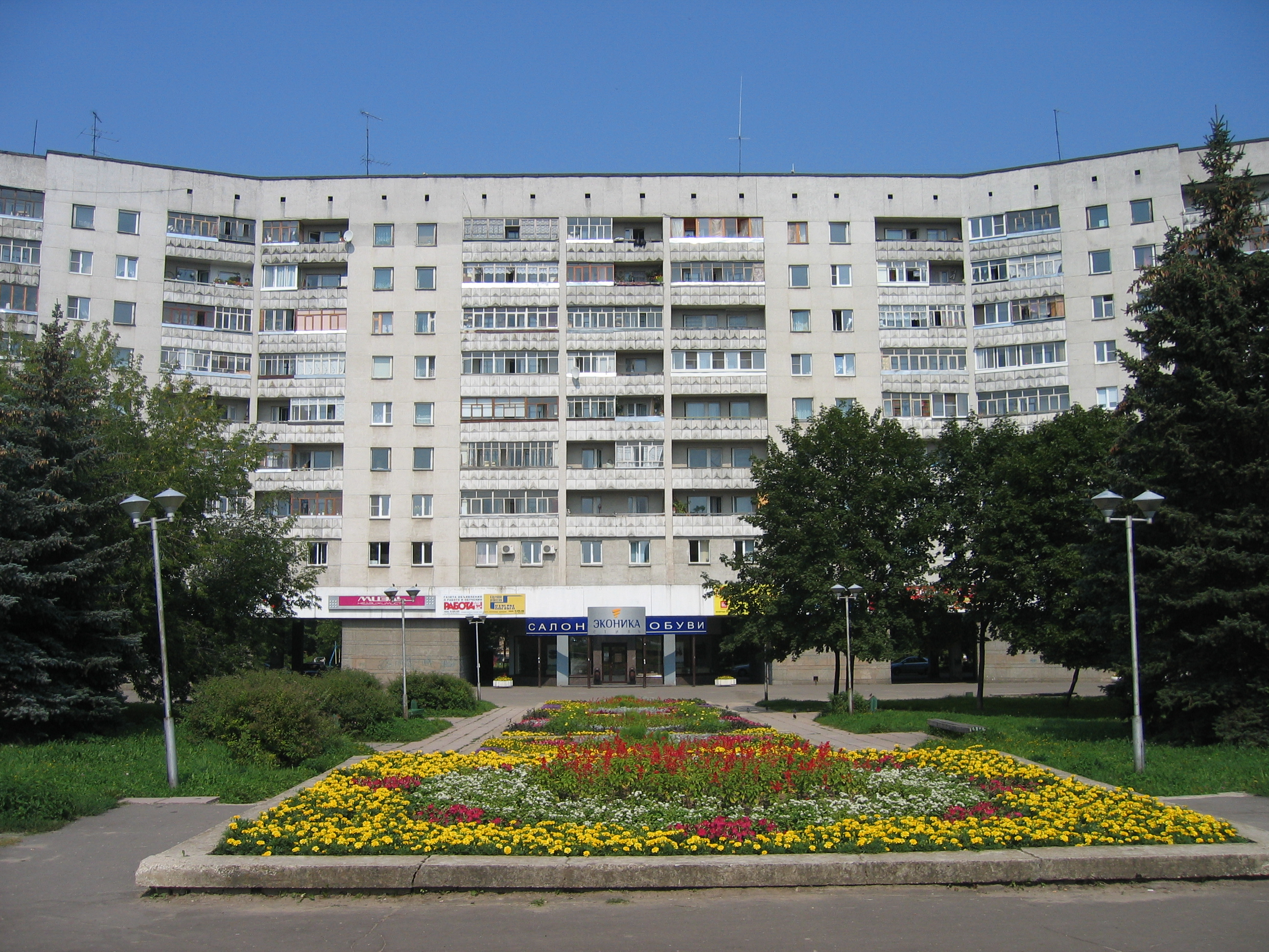 Der „Dreiecksplatz“ in Obninsk